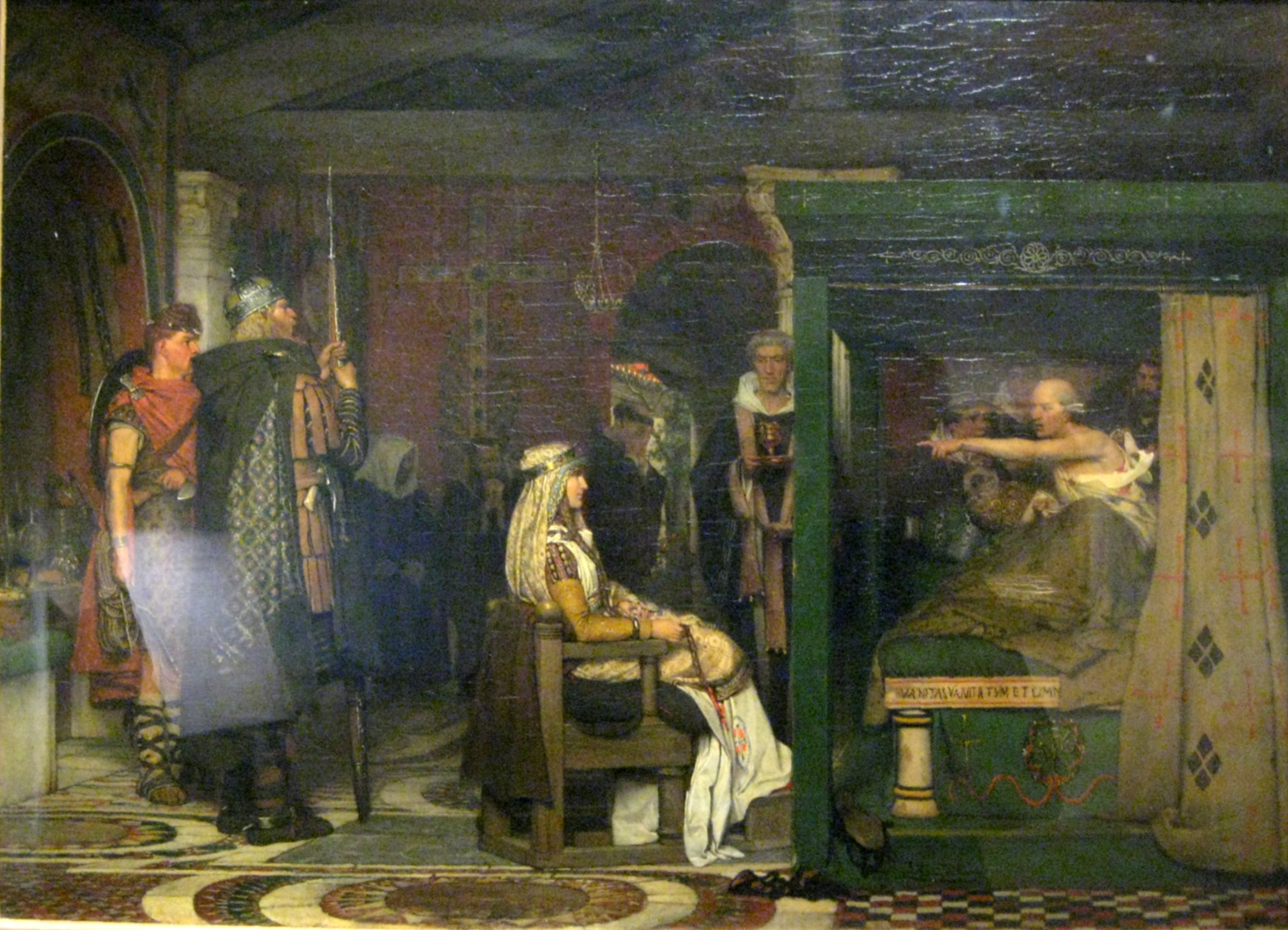 Fredegund by Praetextatus death bed. Collection of Pushkin museum, Moscow[1] « Фредегунда приходит навещать умирающего Претекстата ».